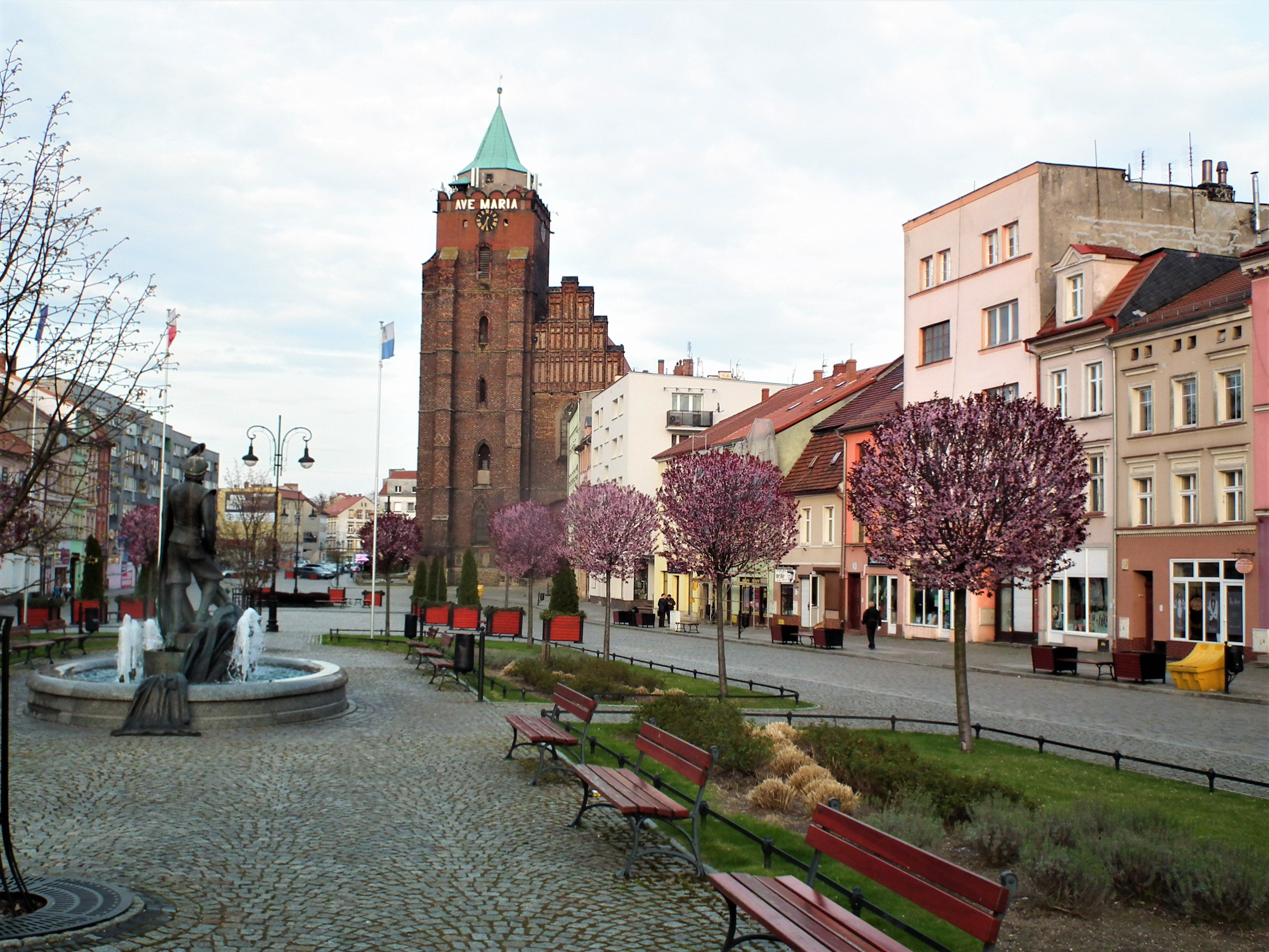 Rynek - Chojnów.